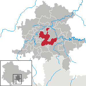 Saalfelder Höhe in Thuringia - District Saalfeld-Rudolstadt